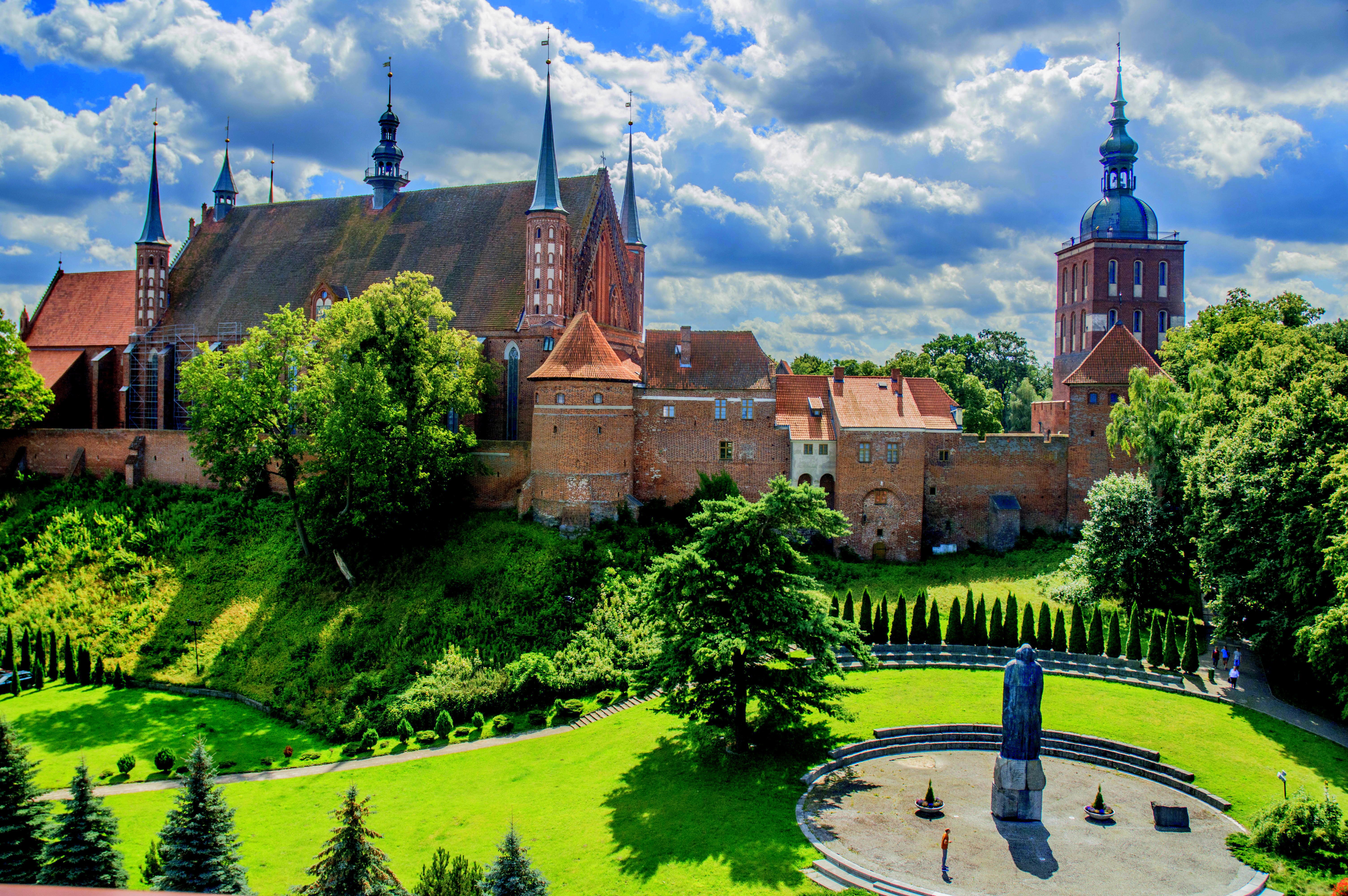 Frombork, Bazylika archikatedralna Wniebowzięcia Najświętszej Maryi Panny i św. Andrzeja we Fromborku, pomnik Mikołaja Kopernika Wikidata has entry Q478321 with data related to this item.